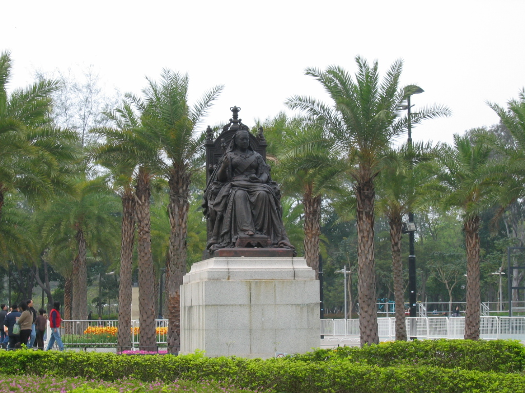 Victoria Park, Hong Kong 維多利亞公園 (香港)